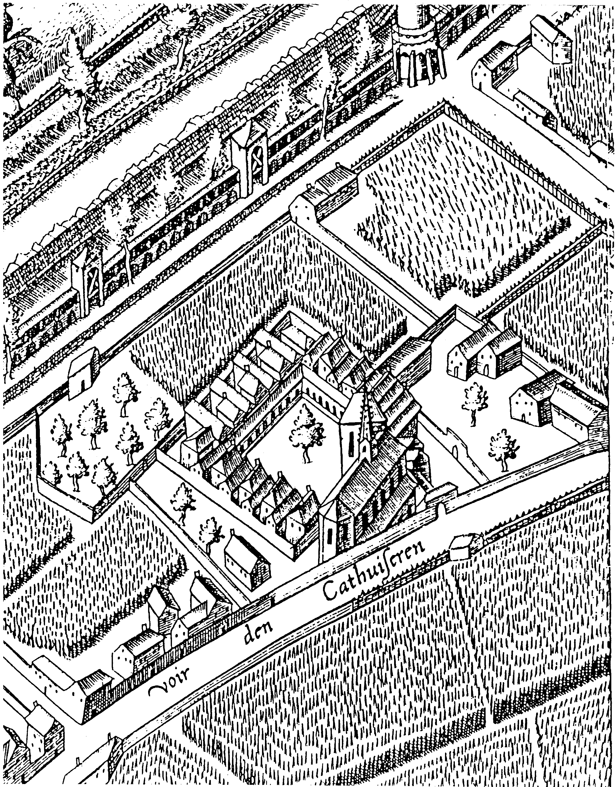 Ausschnitt des Mercator - Stadtplanes, Bereich Ulrepforte und Kartause